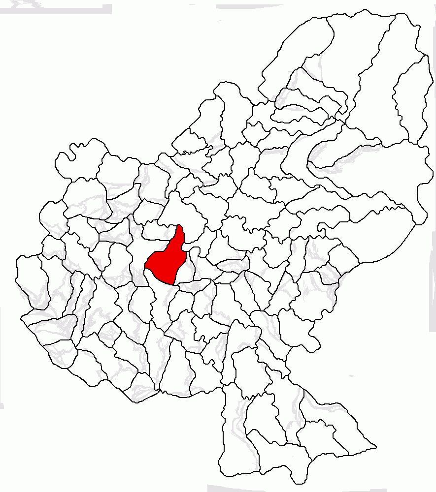 Categorie:Hărţi ale judeţului Mureş